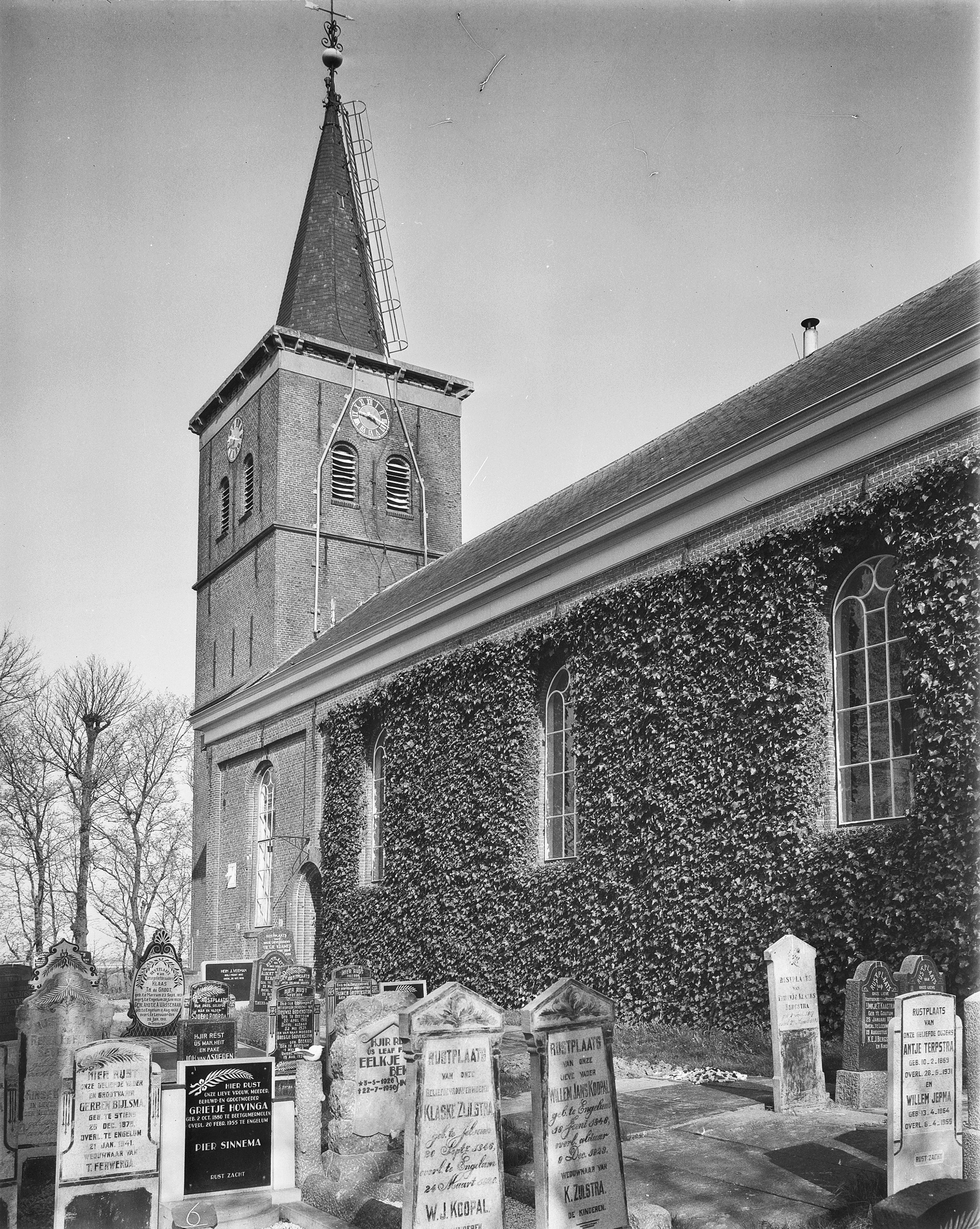 Nederlands Hervormde Kerk: exterieur